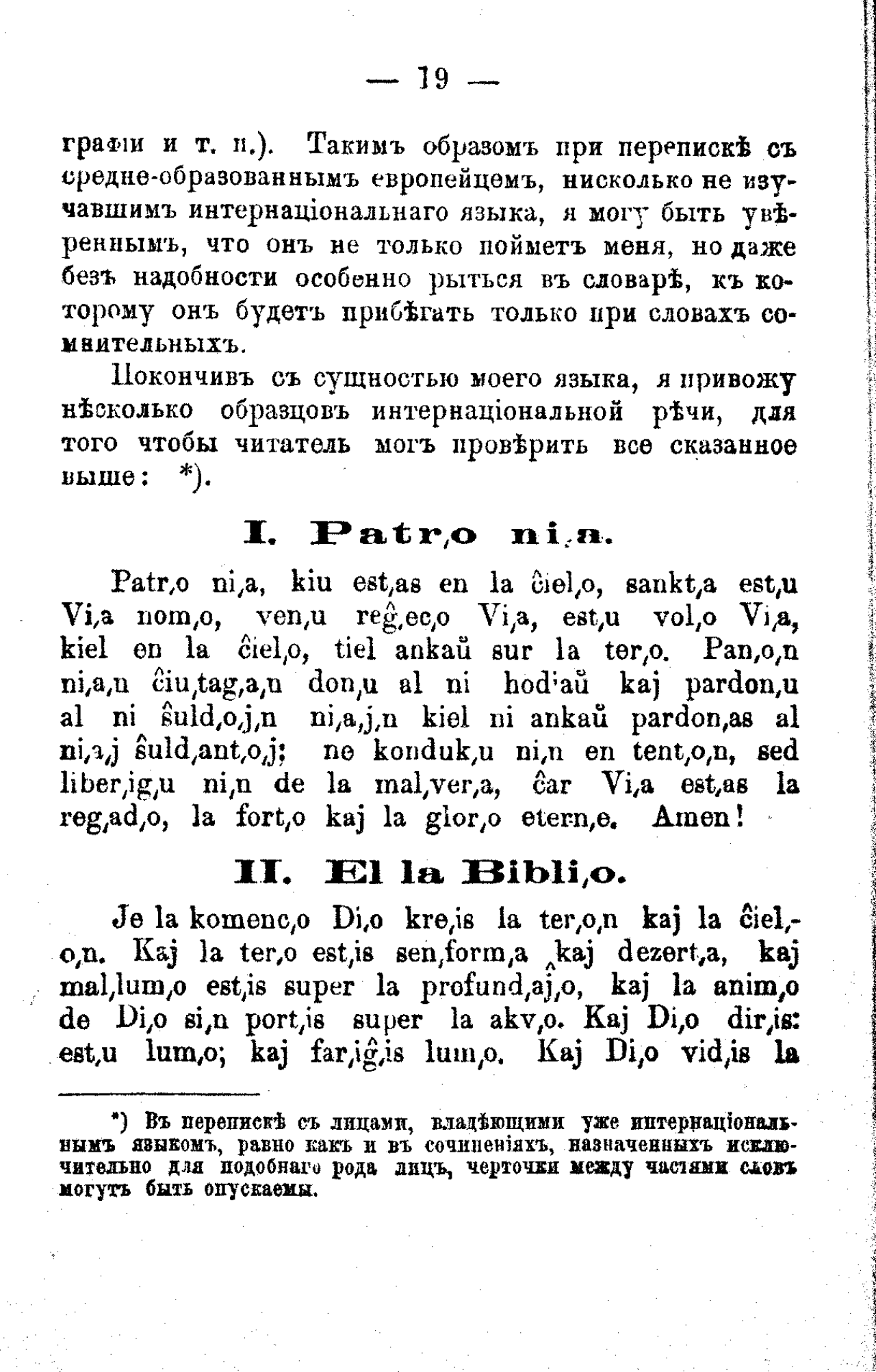 Paĝo 19-a de la Unua Libro, 1887, prezentanta la Sinjorpreĝon en ties unua kaj zamenhofa versio en Esperanto.